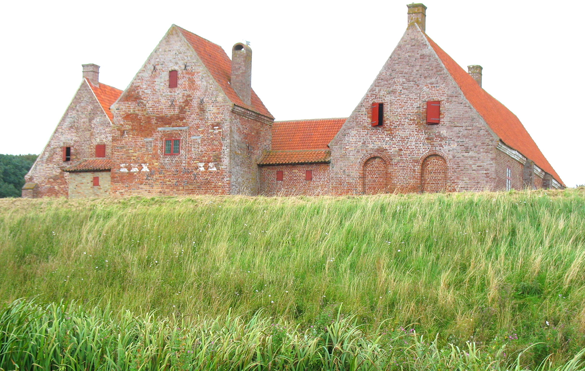 Borgen lå godt beskyttet bag sine jordvolde.